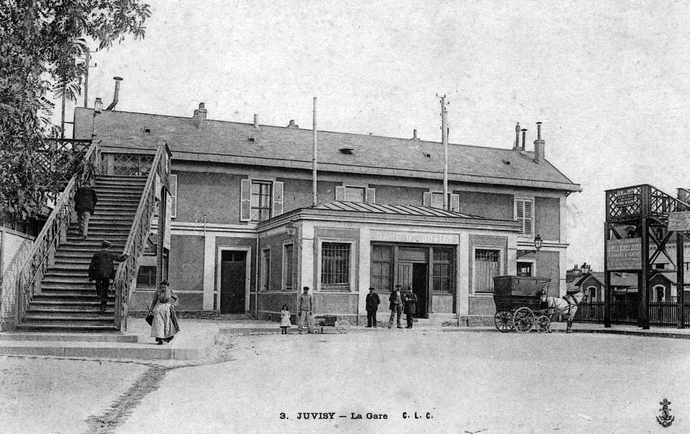 Le premier bâtiment en dur de la gare de Juvisy (vers 1900)